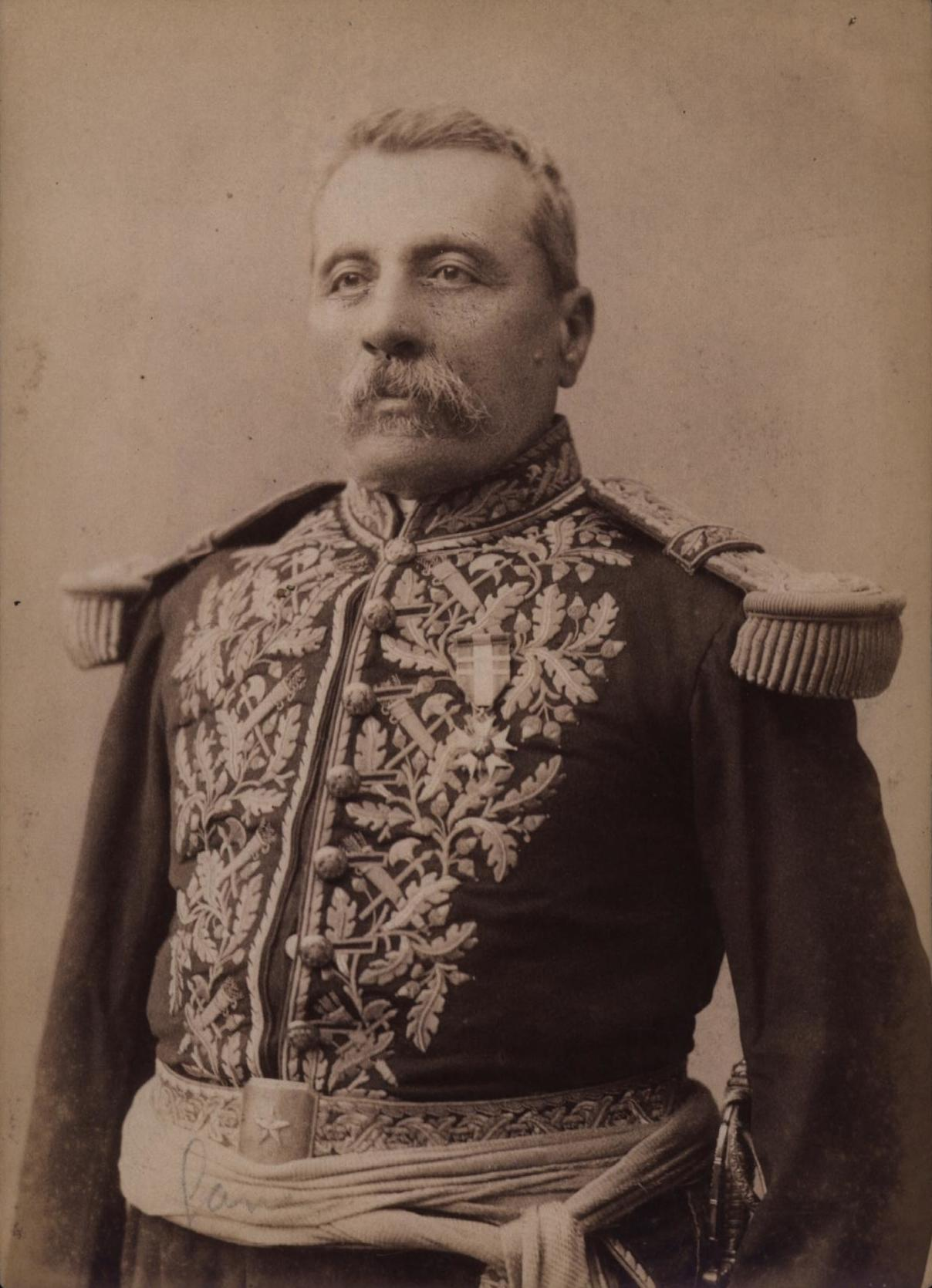 José Francisco Gana Castro (Talca, 19 de febrero de 1828-Barcelona, 1894) fue un militar chileno. Fue comandante en jefe del ejército en la guerra civil de 1891.